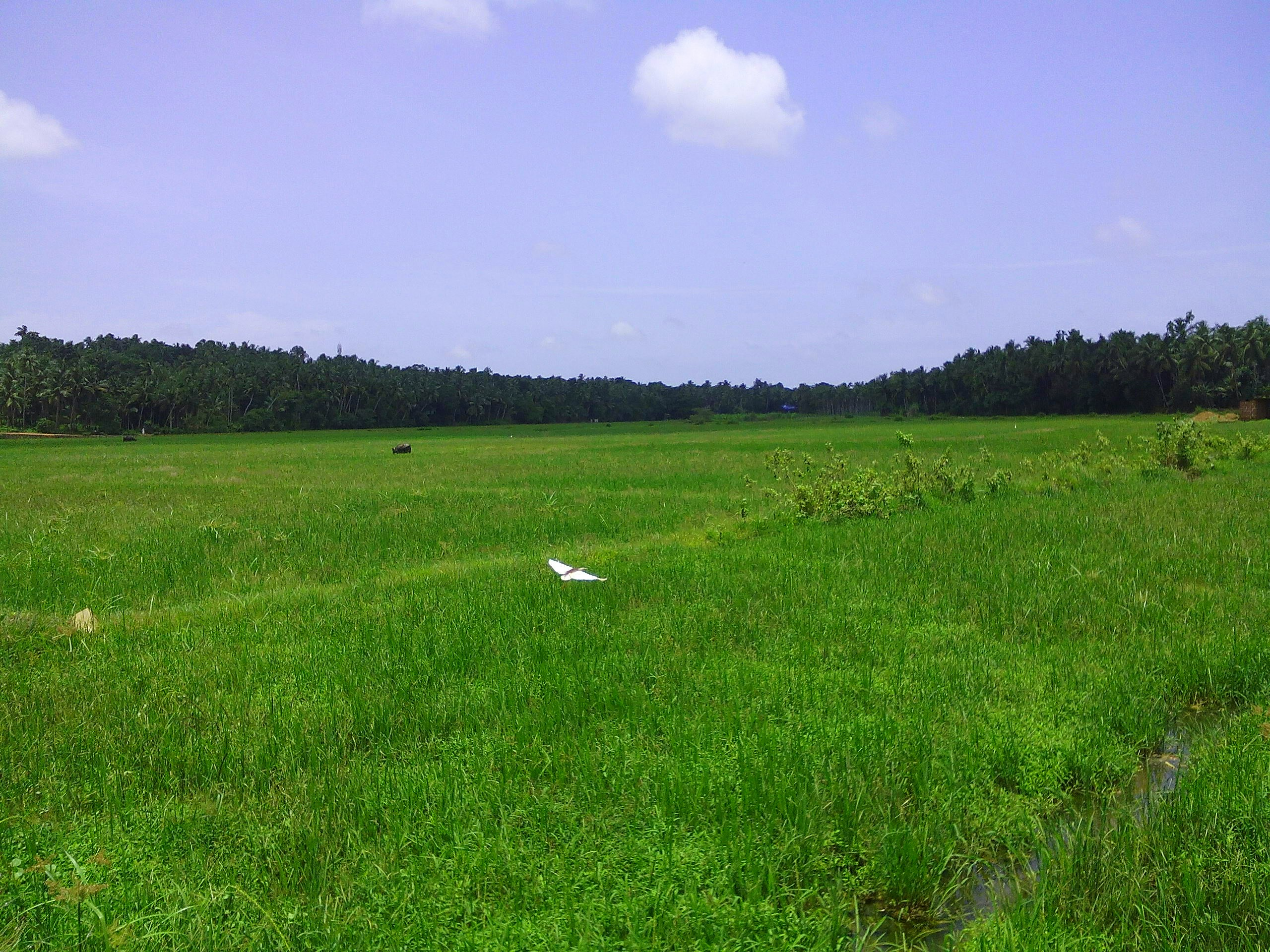 പൊറ്റാണിൽ പാടം എ.ആർ.നഗർ പുകയൂർ ഗ്രാമം